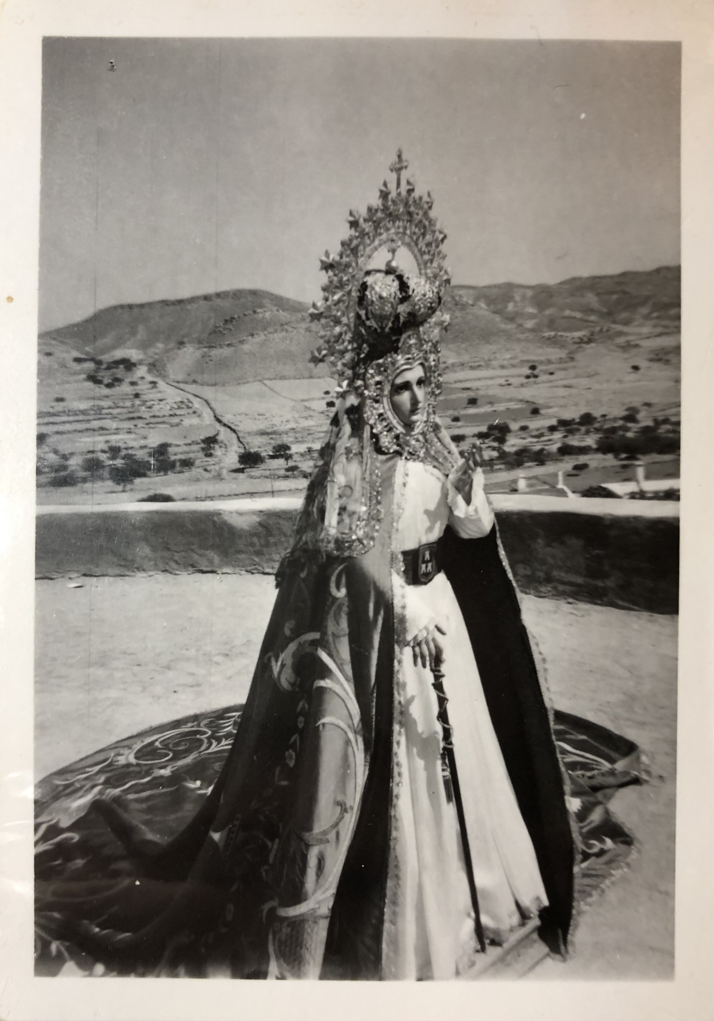 Estampa típica antigua de la Virgen de Monte-Sión (Década 1950)